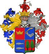 Герб Іршави